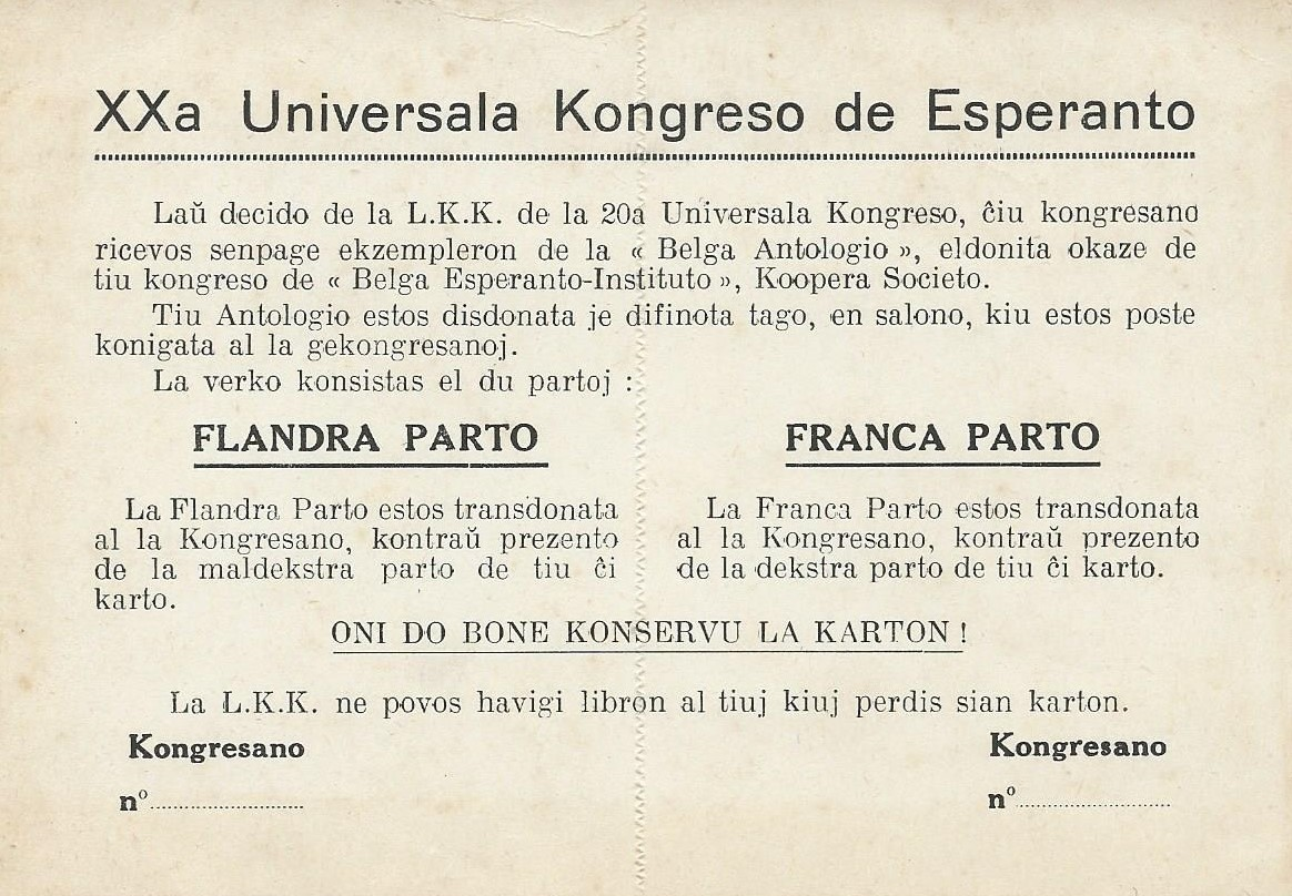 formularo; Antverpeno; Universala Kongreso de Esperanto; 1928